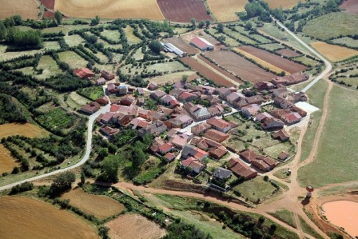 Vista aerea de la localidad de Valvieja